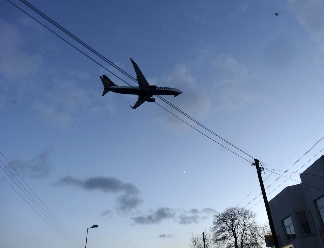 Lądujący samolot pasażerski nad osiedlem Glinki w Bydgoszczy